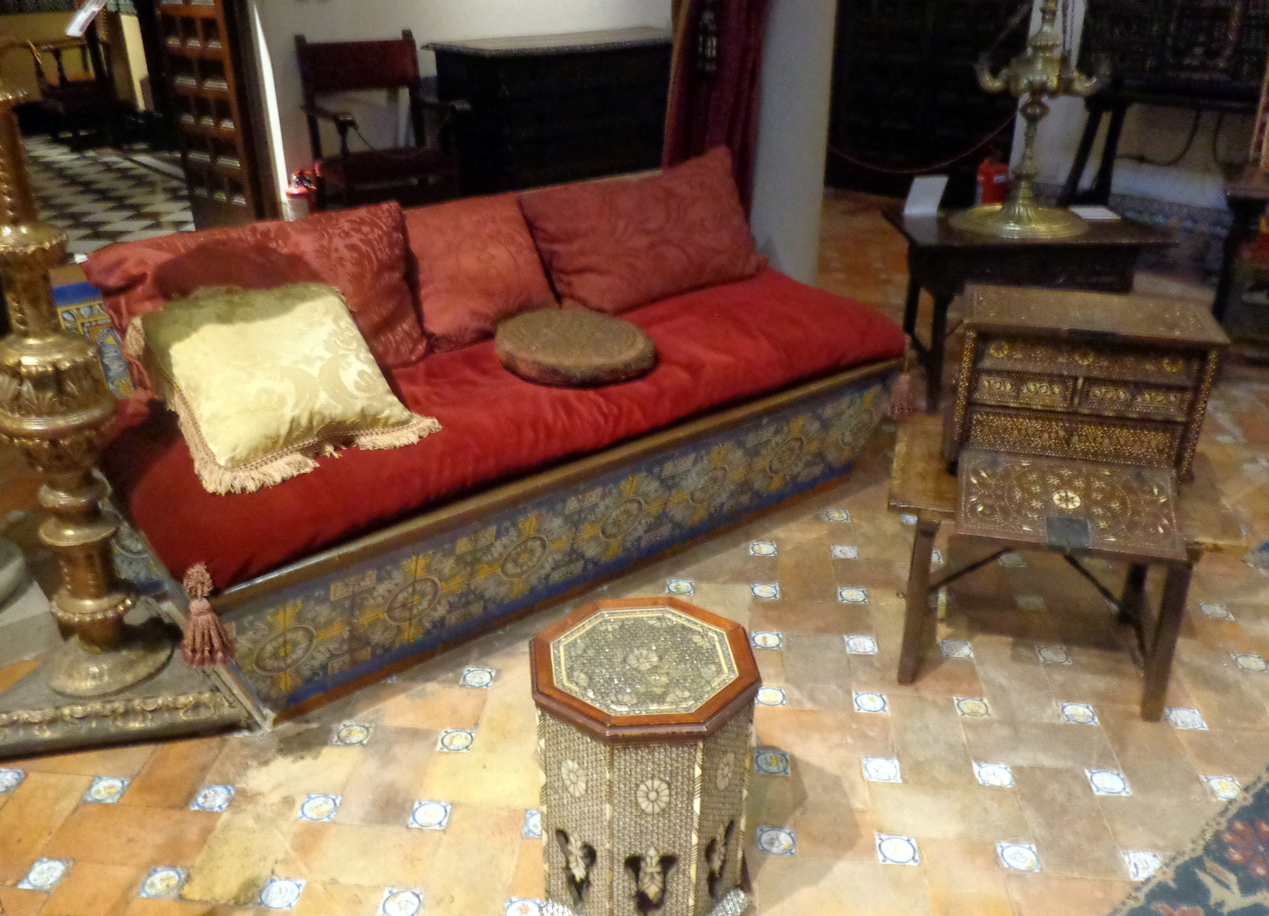 Museo de Arte Español Enrique Larreta, Barrio de Belgrano, Buenos Aires, Argentina.